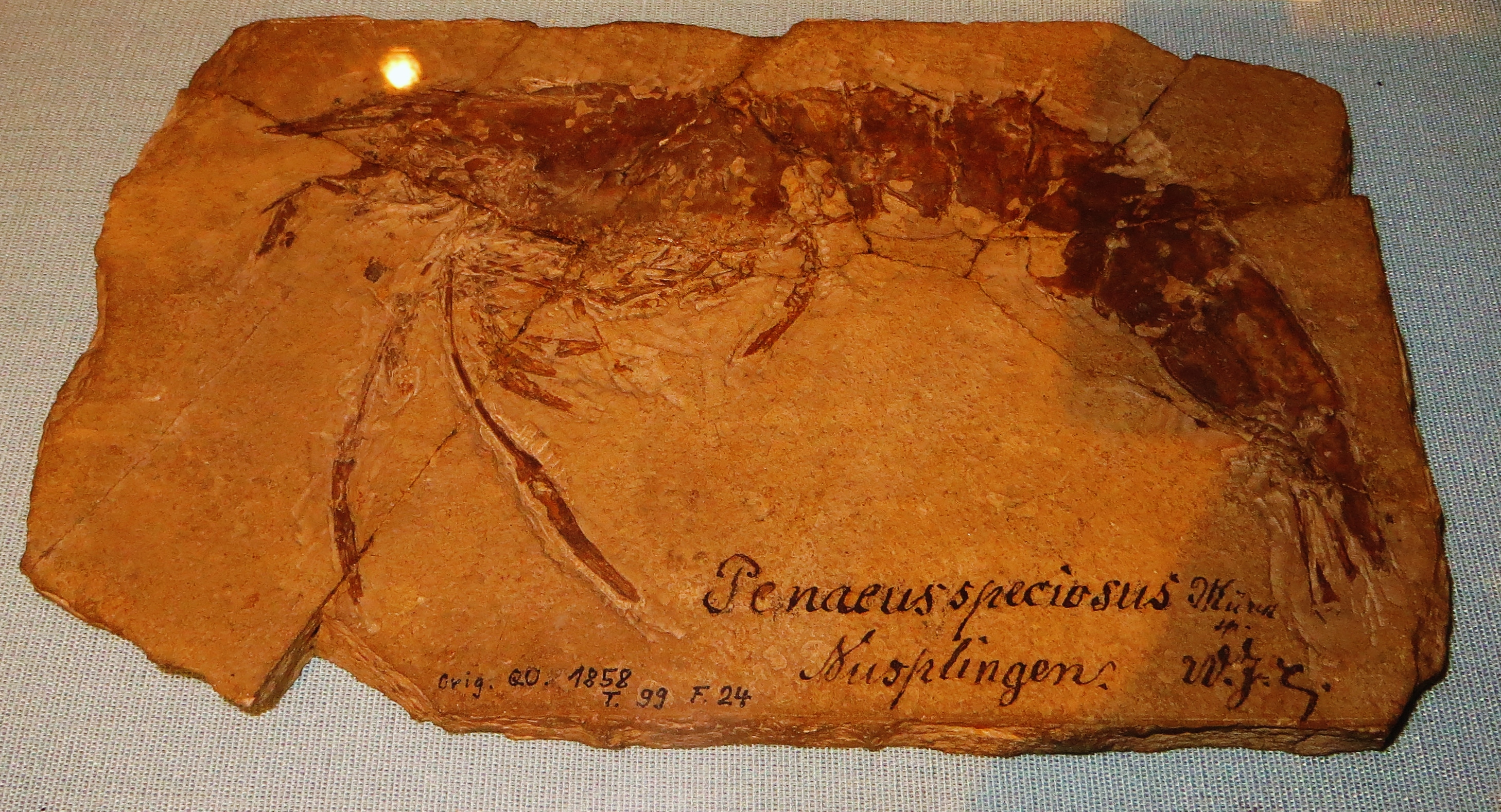 Fossil of Antrimpos, an extinct crustacean- Took the picture at Museum of Paleontology, Tubingen